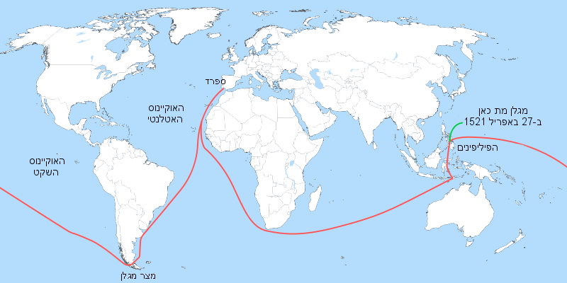 מפת המסע של מגלן שתרגמתי לעברית Contents 1 רישיון 2 יוצרים 3 Licensing 4 Original upload log רישיון יוצרים MesserWoland and Petr Dlouhý תרגום הקובץ: orias